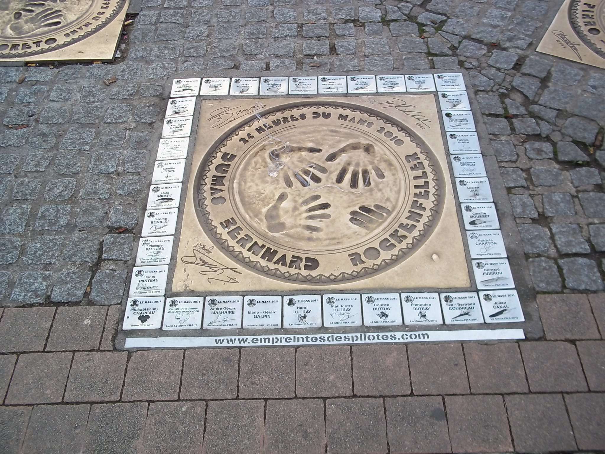 Plaque de bronze des empreintes des vainqueurs des 24 heures 2010